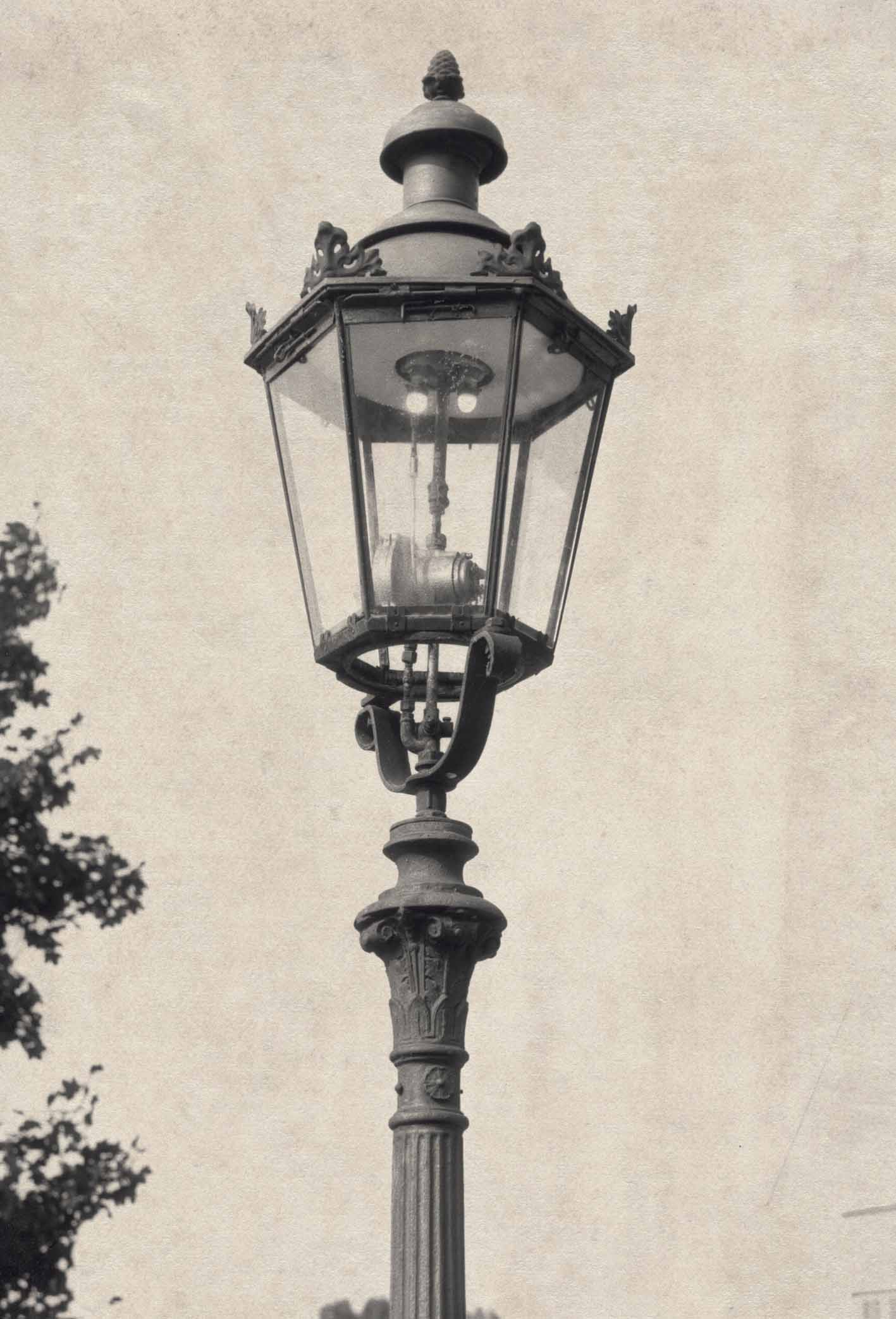 Gaslaterne